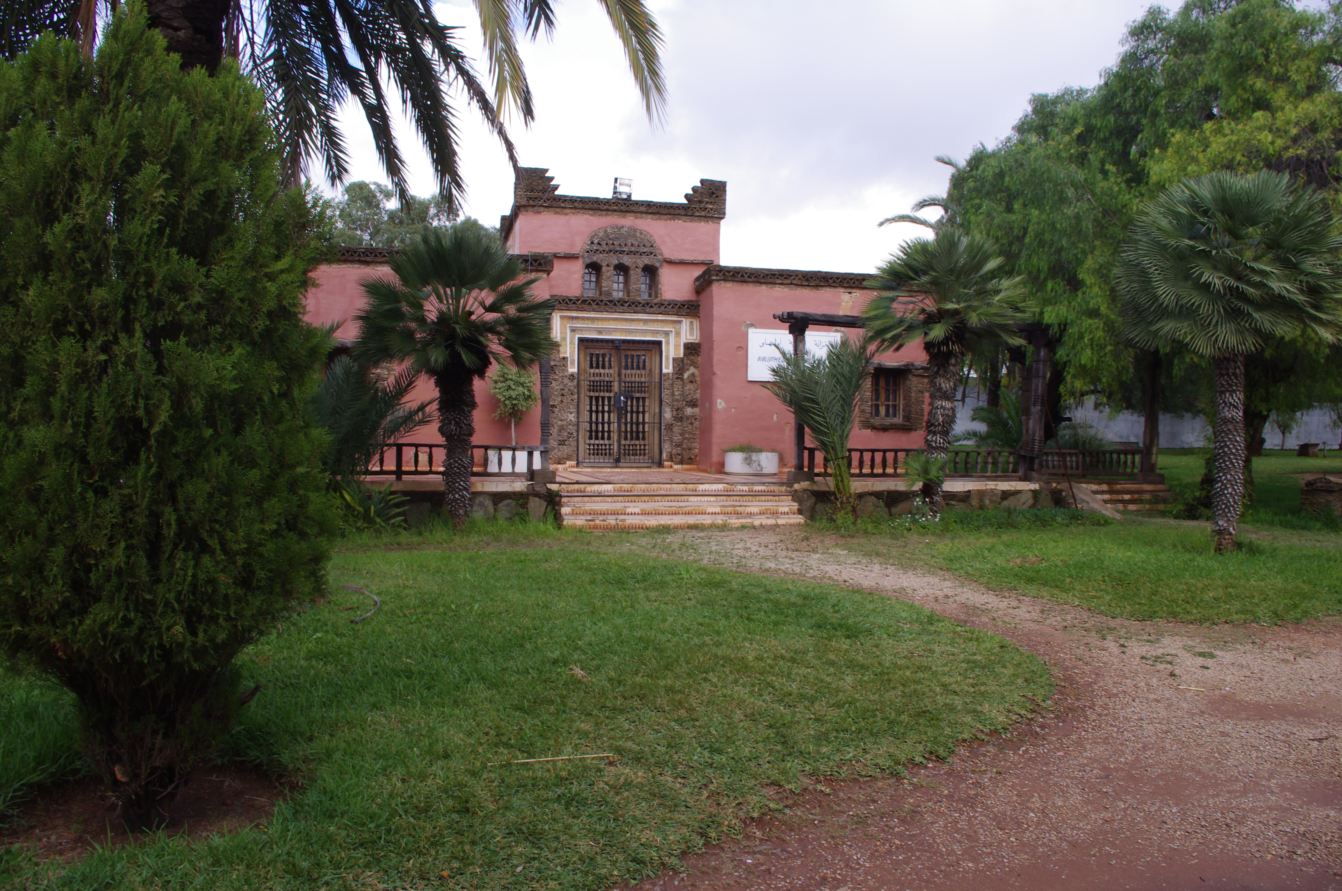 Bibliothek im Park Jardin Olhao